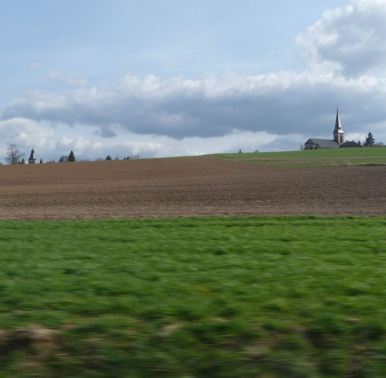 Wattenheim